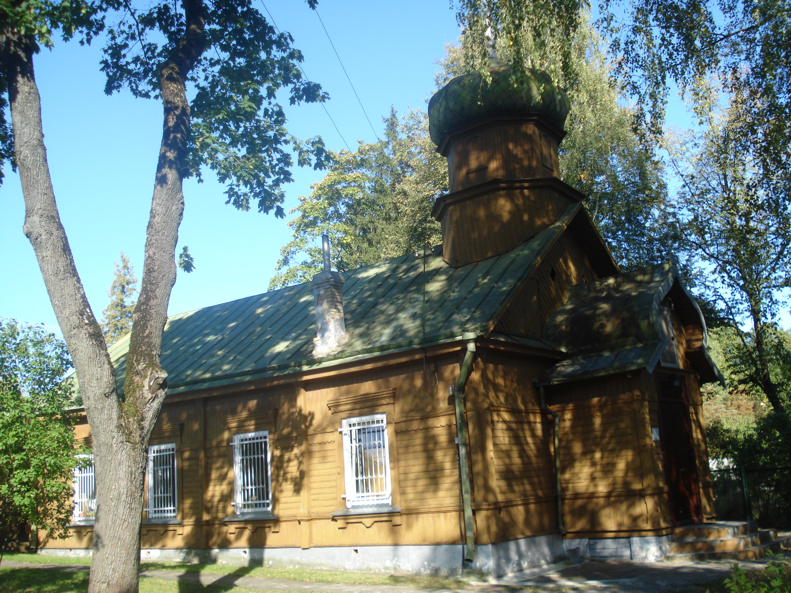 Russian Orthodox Church of St. Peter and St. Paul in Naujoji Vilnia (A. Kojelavičiaus g. 148)